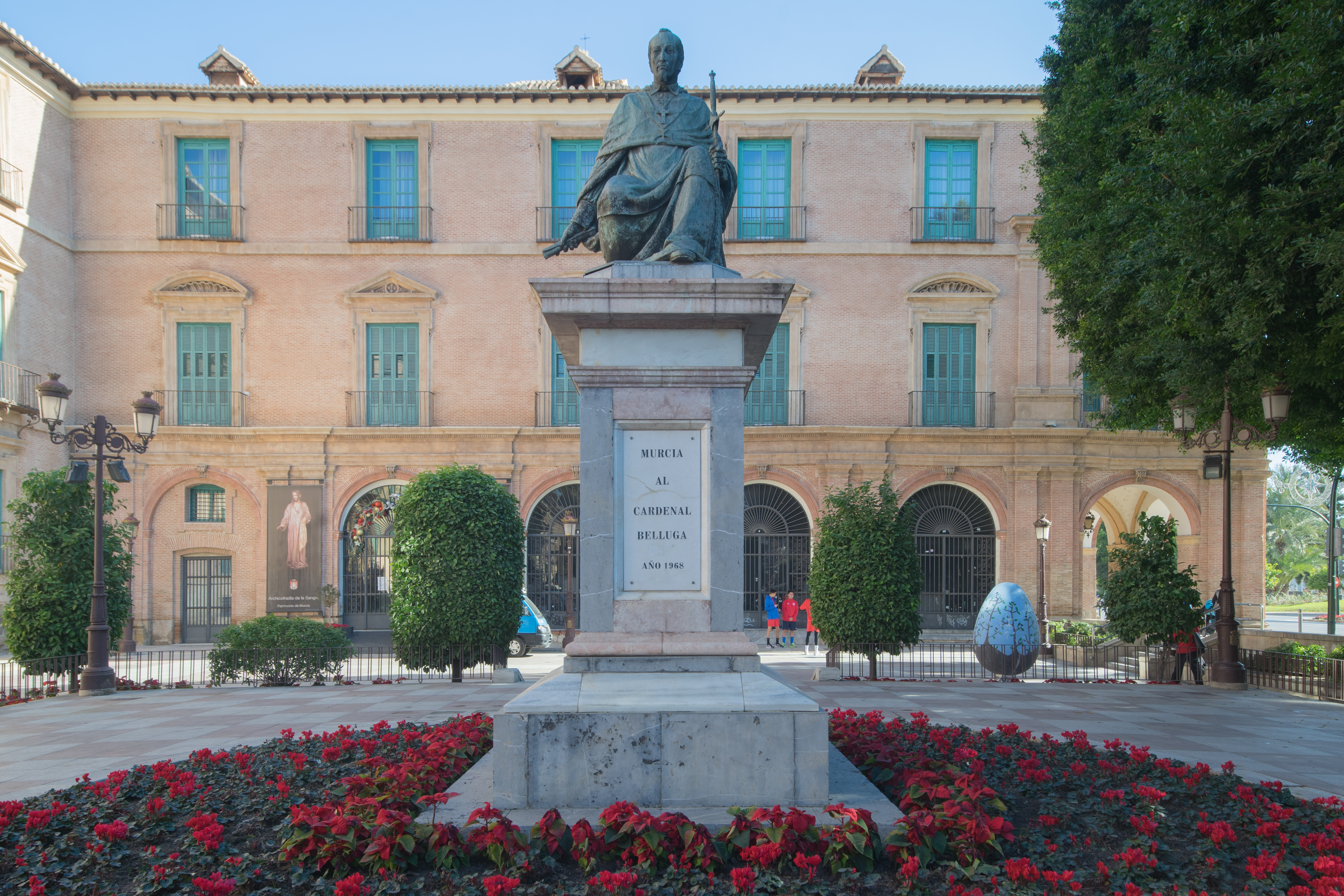 Estatua del Cardenal Belluga, obra de Juan González Moreno, en la Glorieta de España, Murcia.